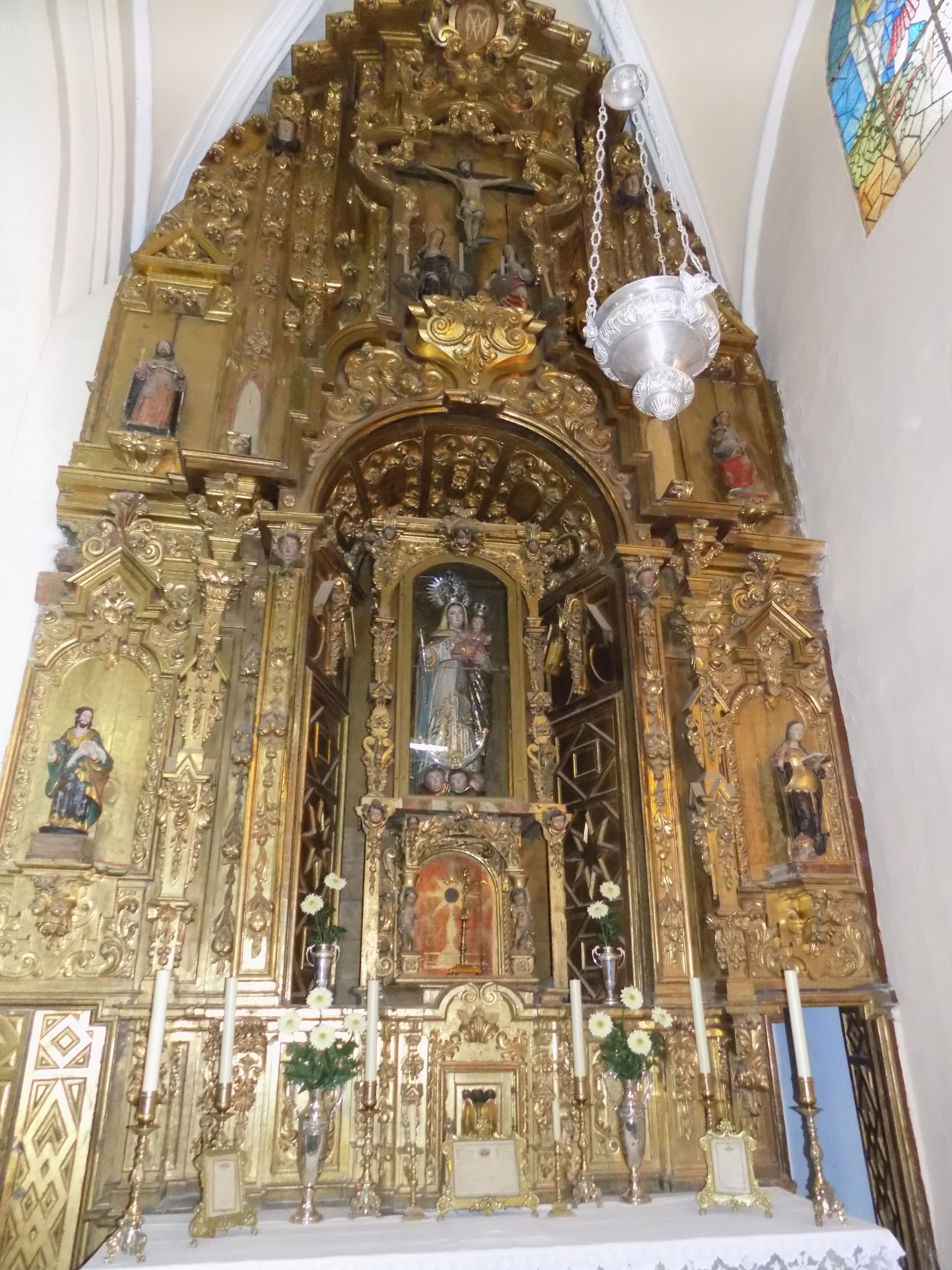 Retablo de la capilla de Ntra. Sra. del Rosario de la Iglesia de Ntra. Sra. del Castillo de Fuente Obejuna.